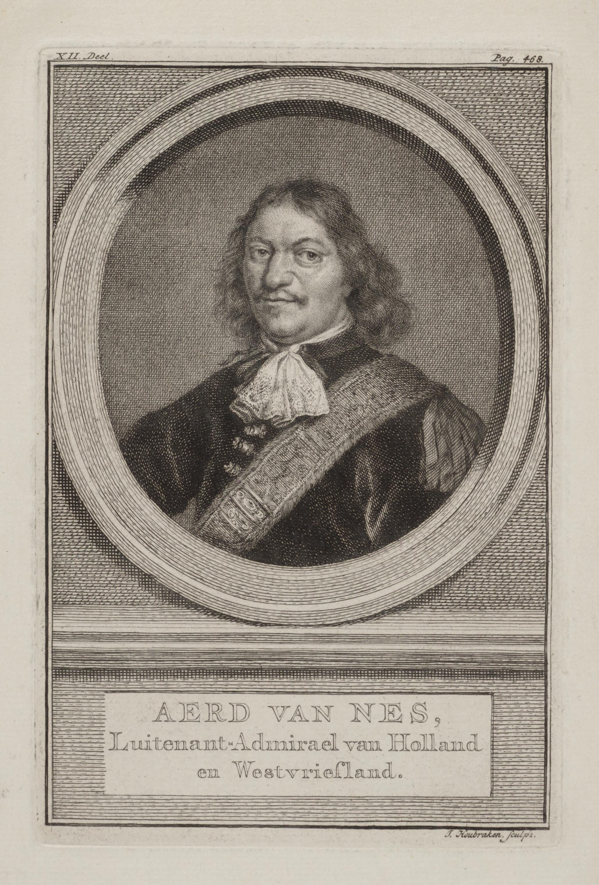 Ets van admiraal Aert van Nes